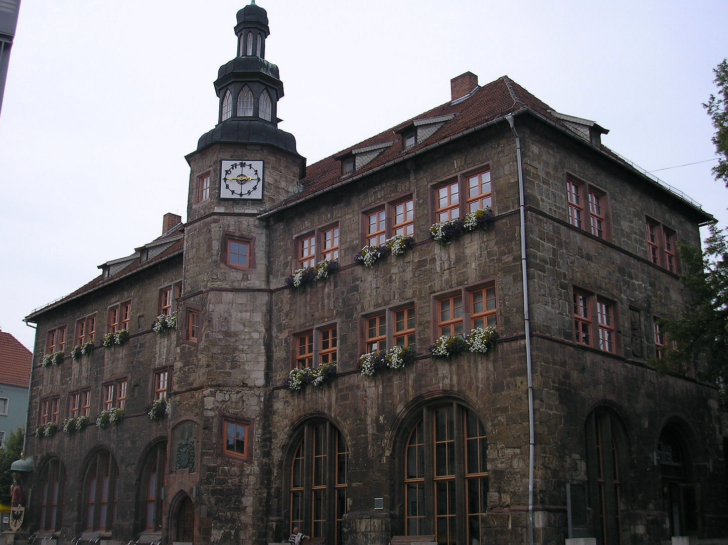 Das Rathaus von Nordhausen (Thüringen).